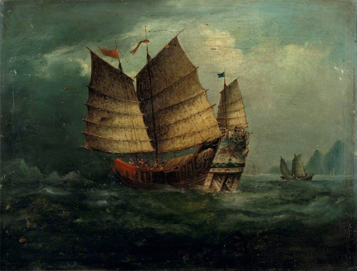 Chinese Junks